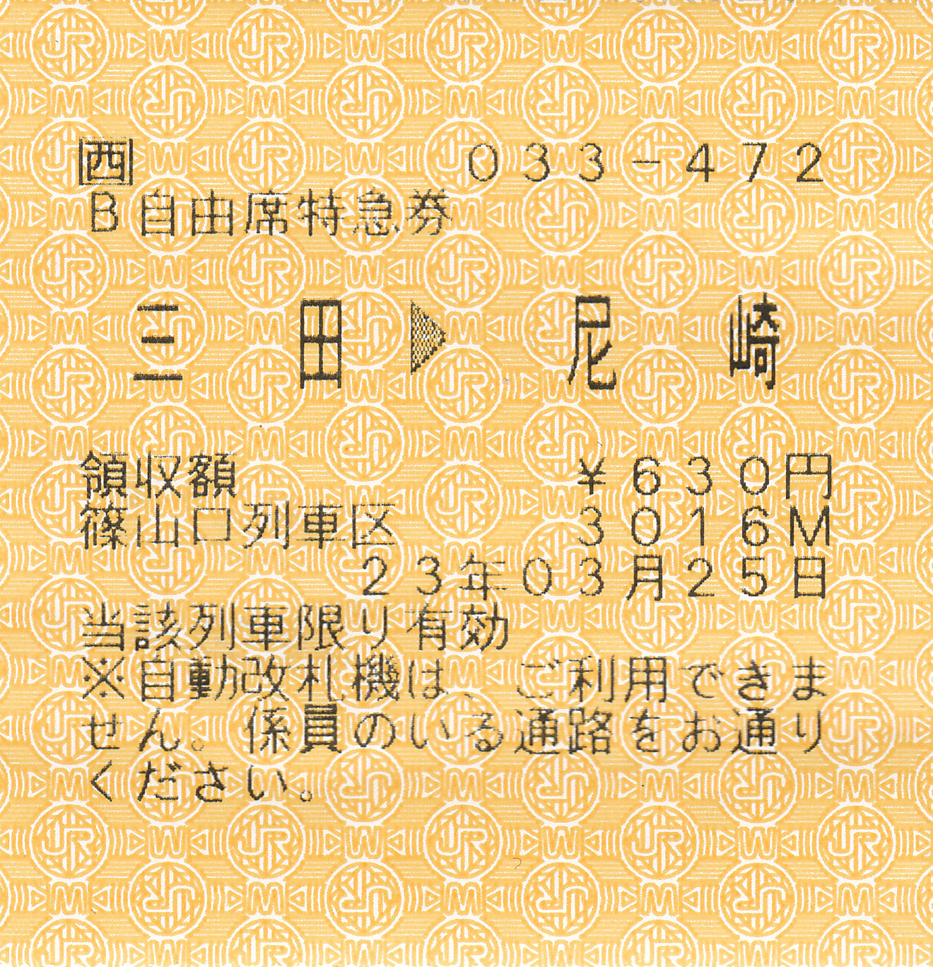 特急こうのとりの車内で発行された、三田→尼崎、のB自由席特急券。